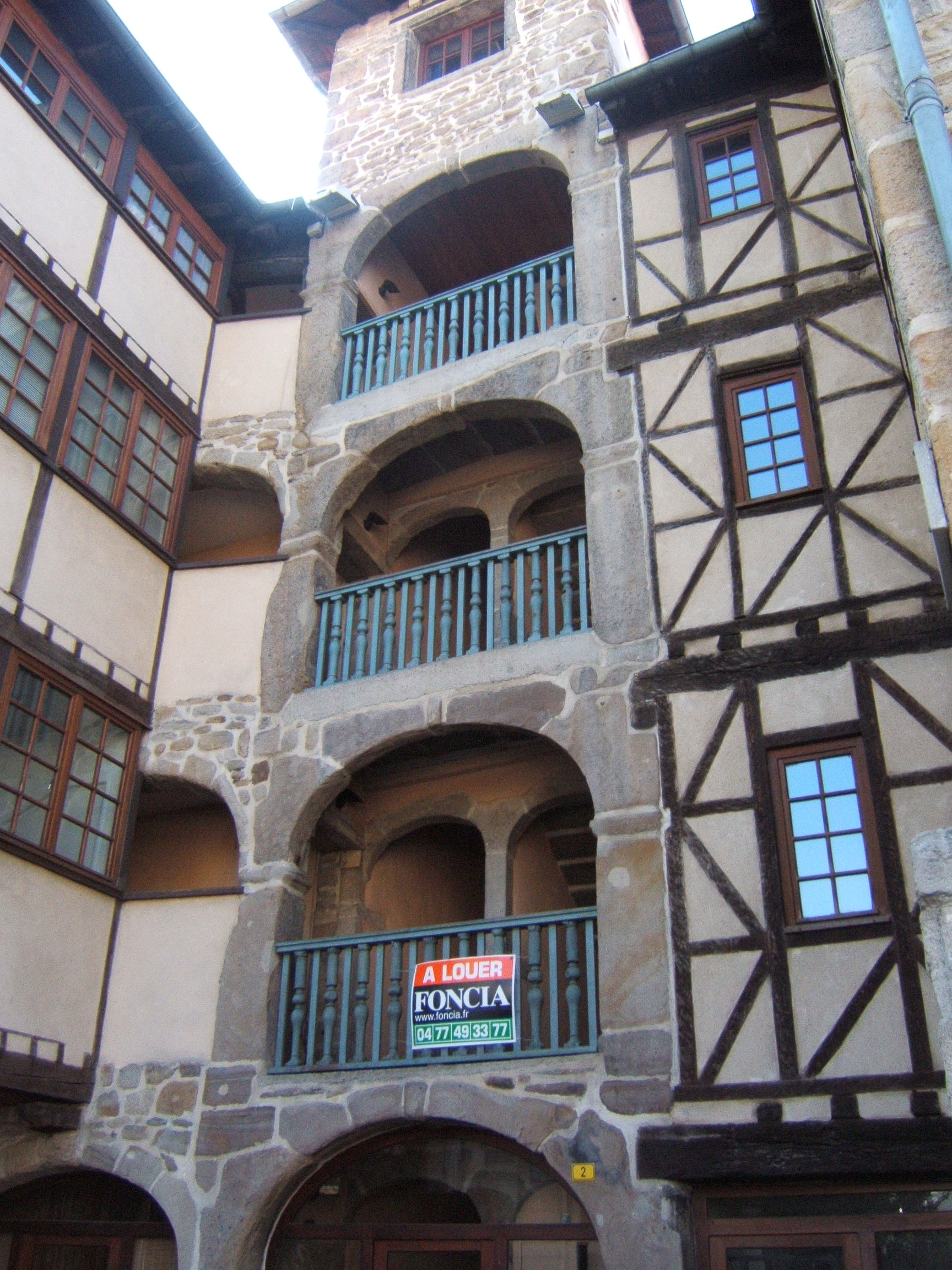 photo par l'auteur d'une des plus vieilles maisons de st etienne restaurée